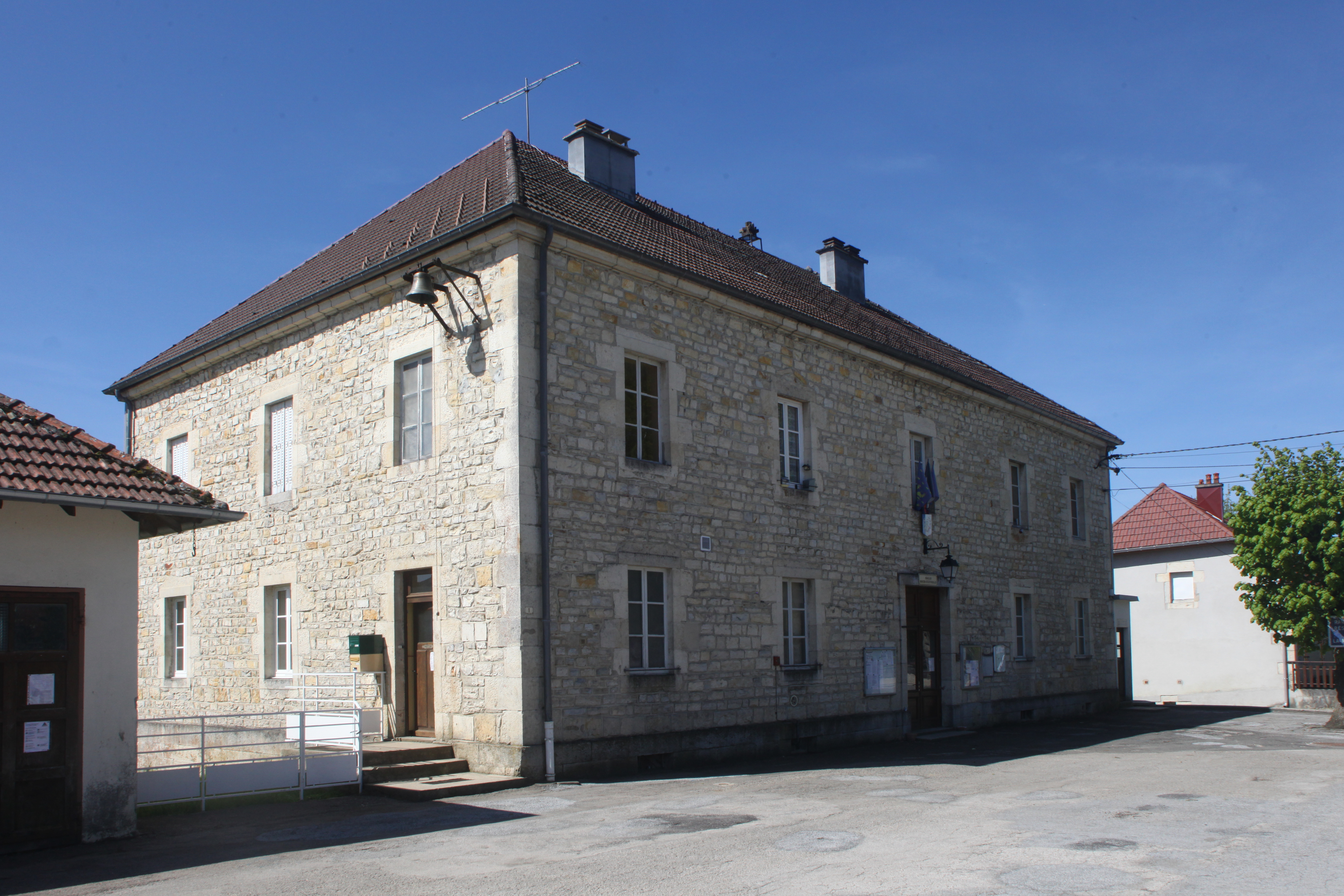 Mairie de Villeneuve-d'Amont (Doubs).